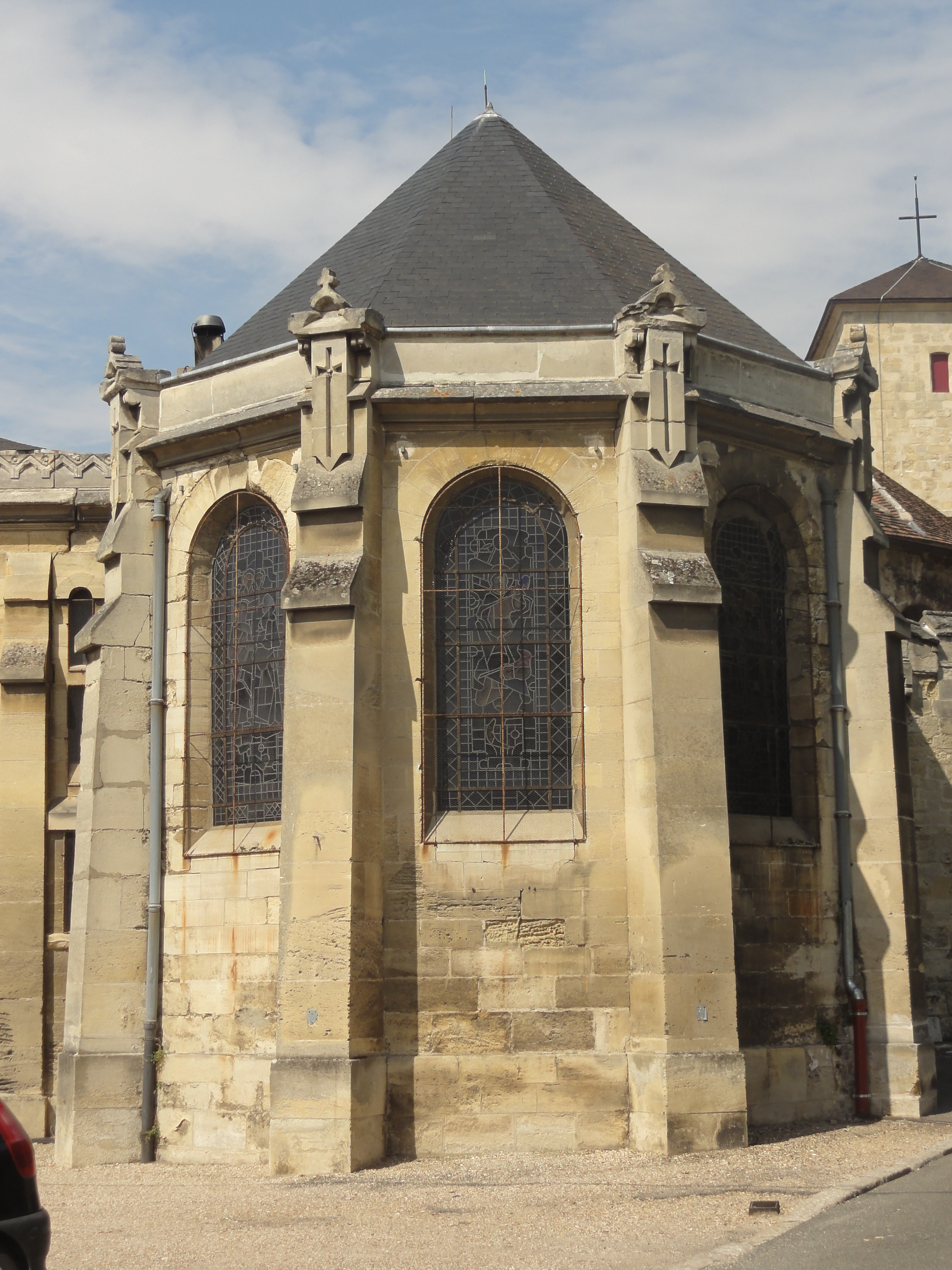 Chapelle Notre-Dame du Sacré-Cœur devant le chevet, consacrée le 24 mars 1878.